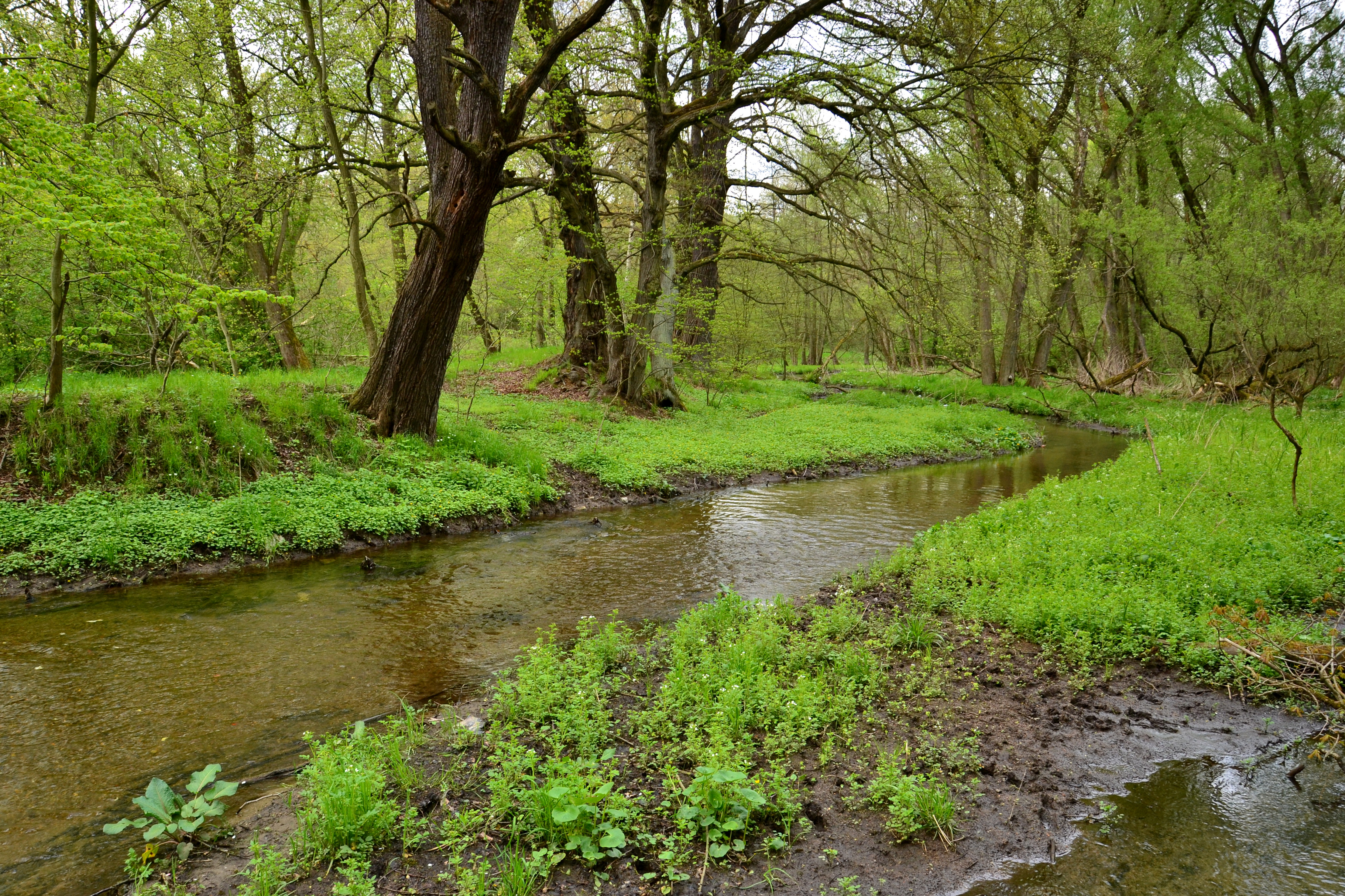 Loupnice mezi Horním Jiřetínem a Janovem